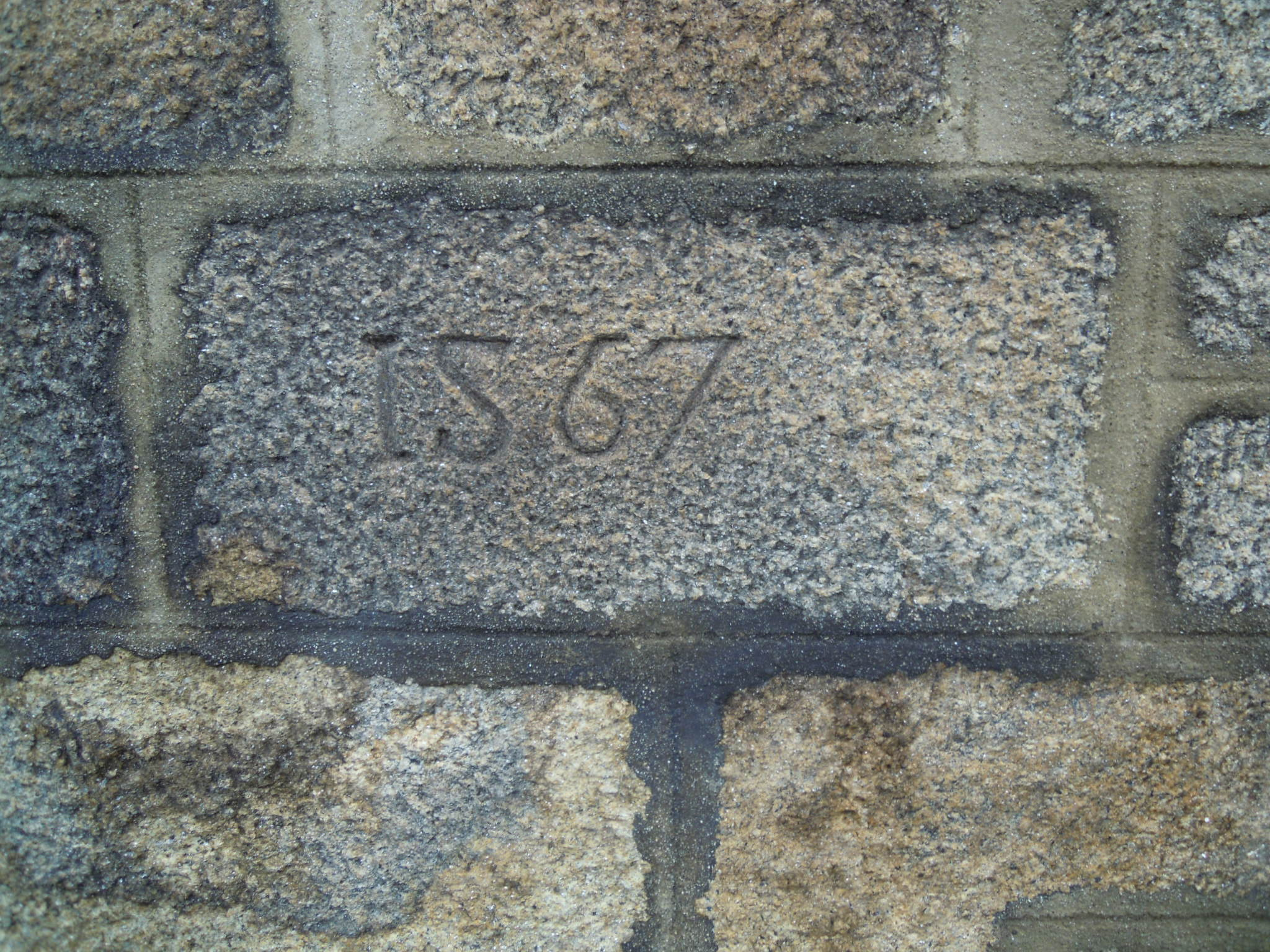 Inscrición coa data gl:1567 na igrexa parroquial de Tamaguelos (Verín).